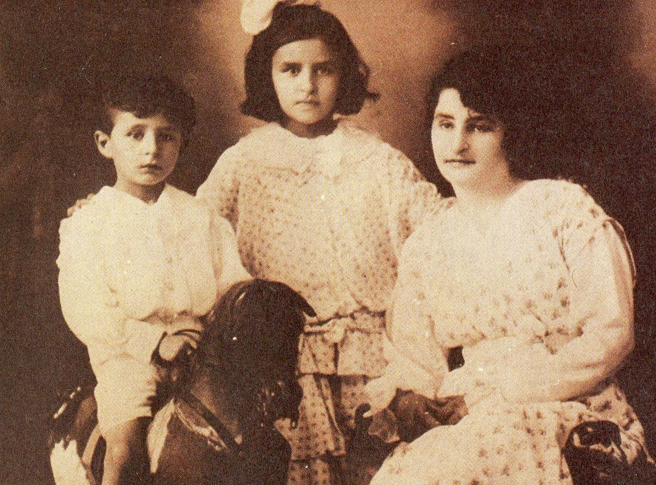 Tita Merello con su hermano y su madre, c. 1910